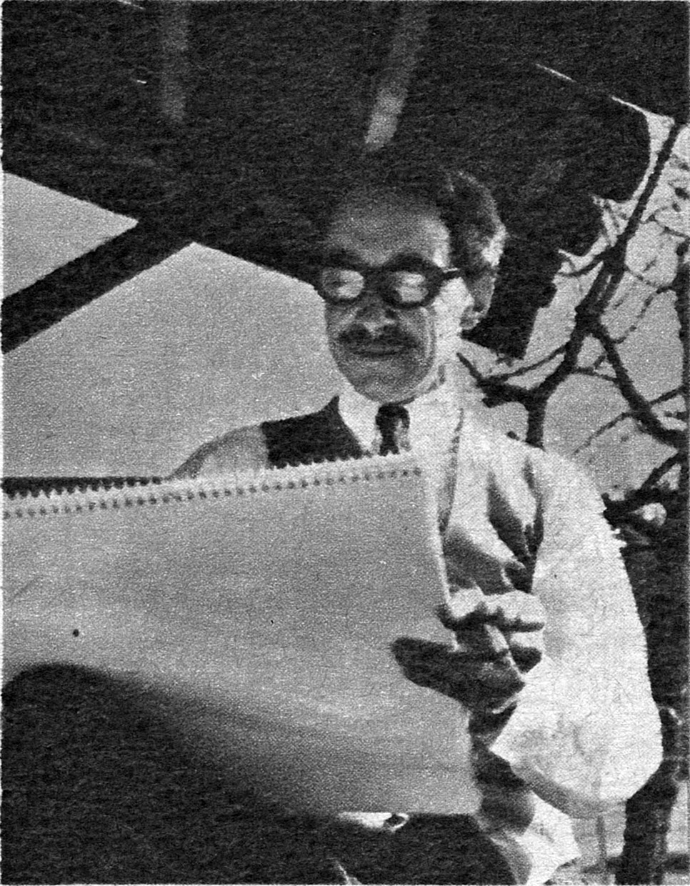 Lars Lindh.